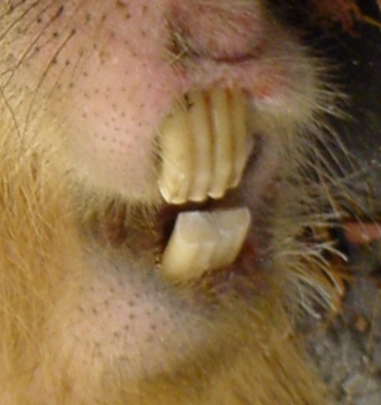 Schneidezähne eines Capybara